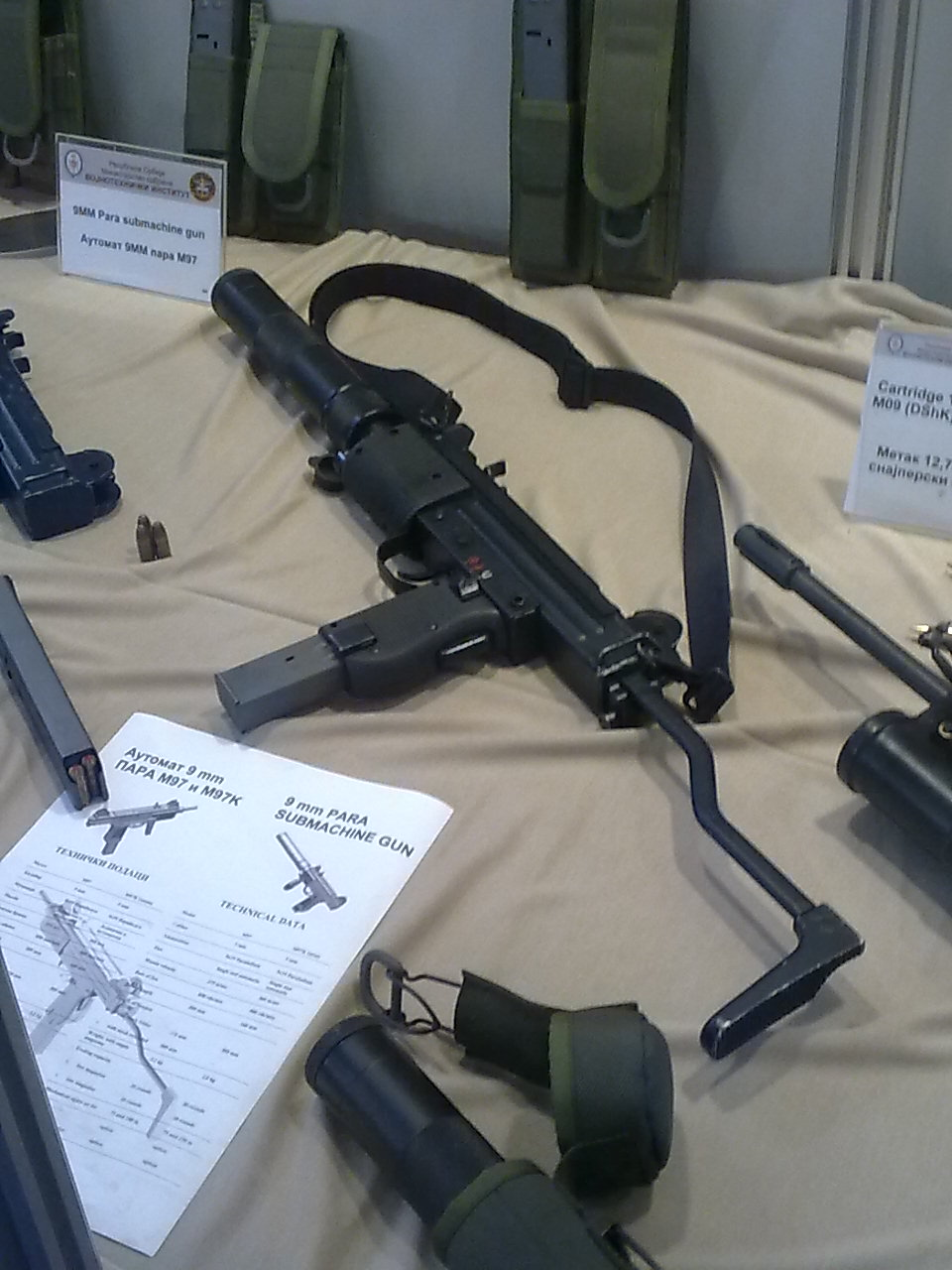 М97 аутомат 9мм ПАРА, новитет у Војсци Србије